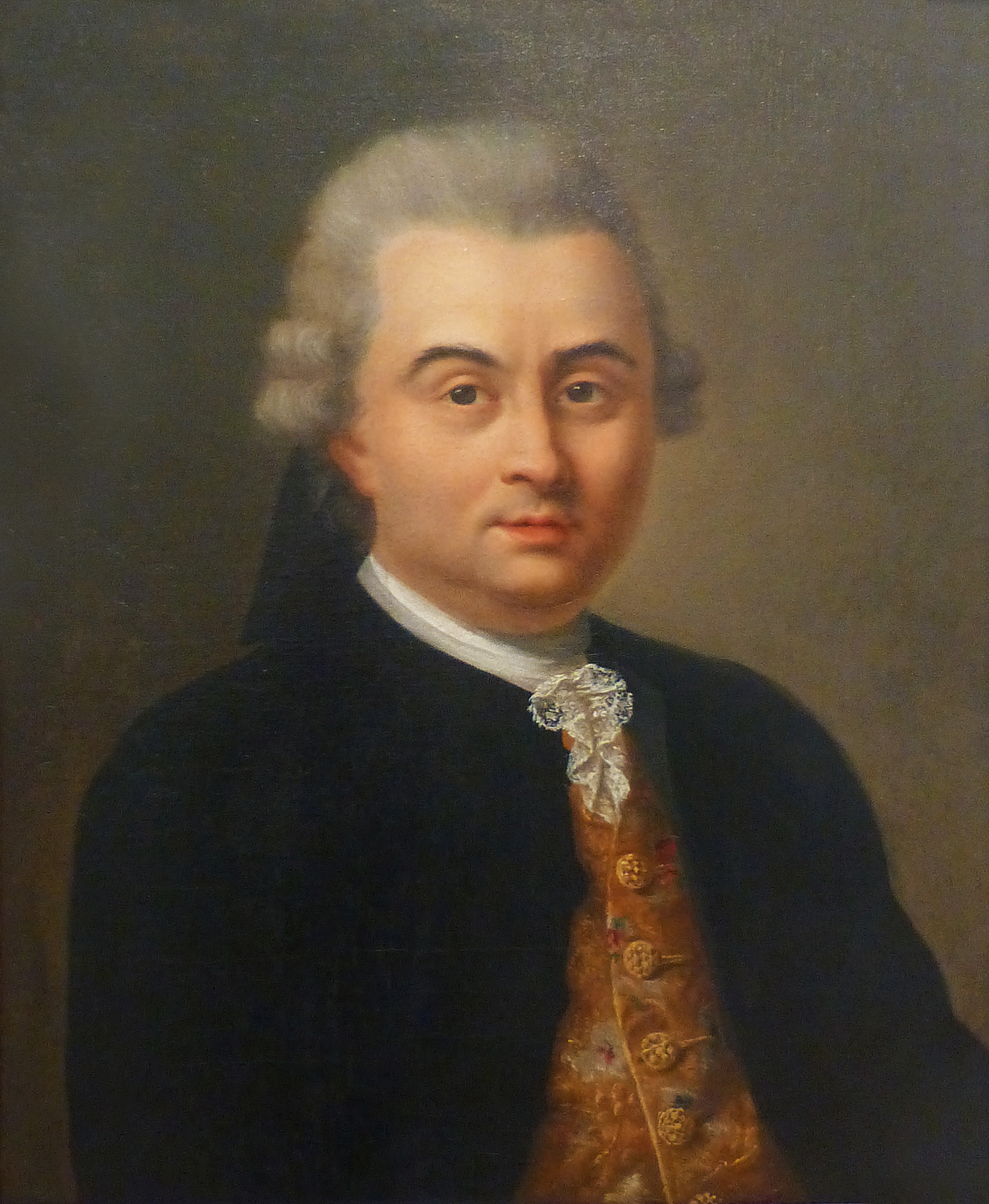 Franz Anton Mai (1742-1814). Professor für Med. Institutionen u. Hebammenkunst, Heidelberg, 1773-1807. Maler : Johann Peter Hoffmeister Universitätsmuseum (Heidelberg). Leihgabe Kurpfälzisches Museum